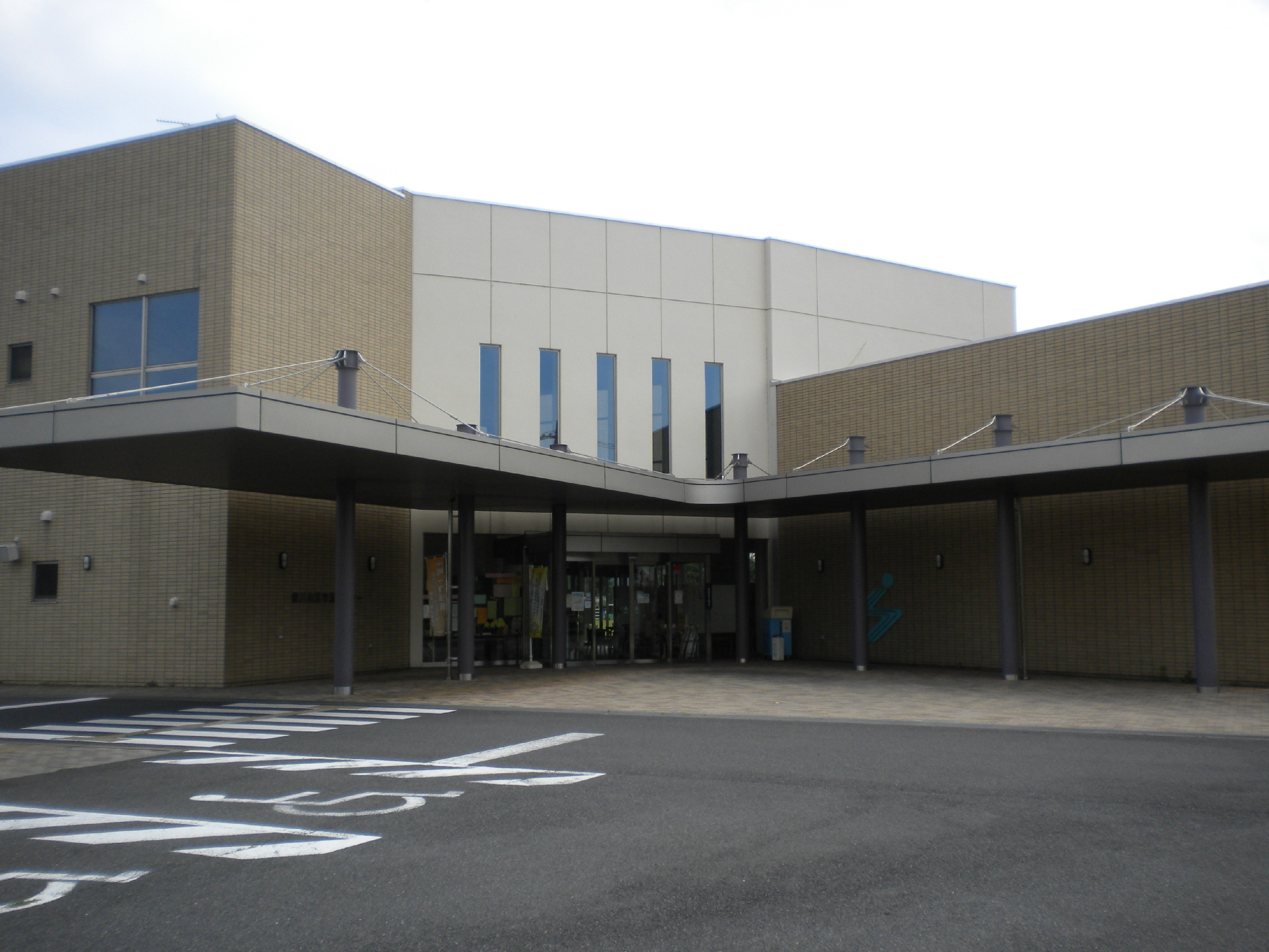 宇都宮市姿川地区市民センター 宇都宮市西川田町にて